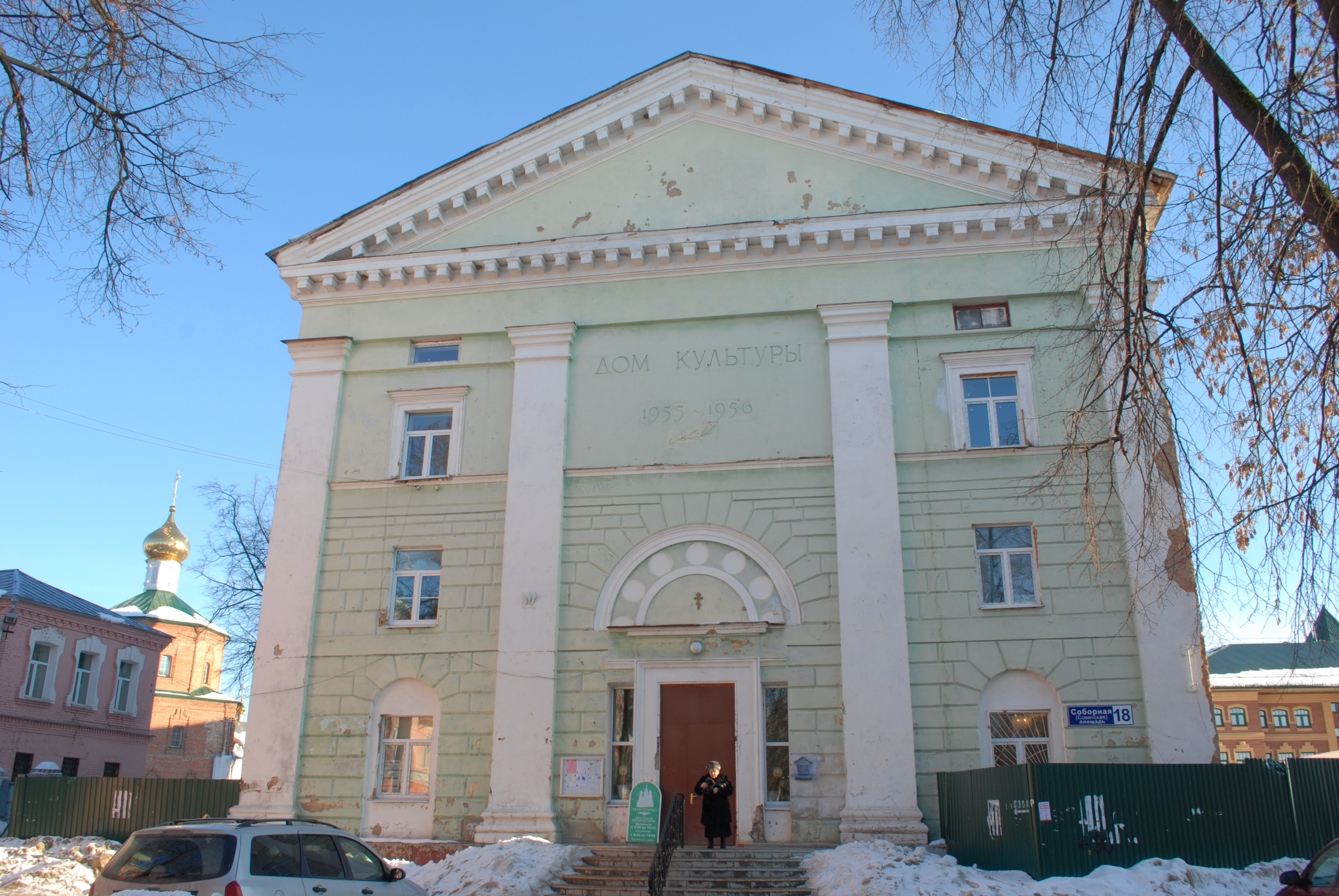 Собор Святой Троицы (Москва и Московская область, Клин, Советская площадь, 3)